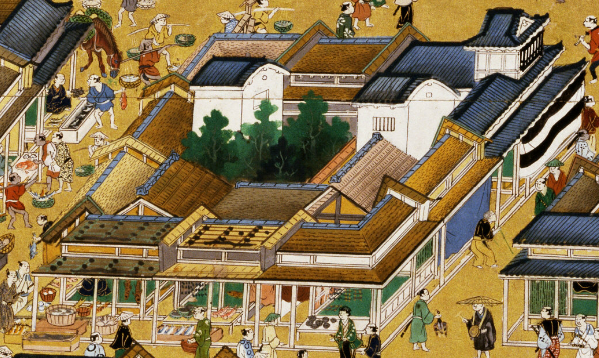 江戸図屏風に描かれた江戸時代初期の日本橋の町屋。